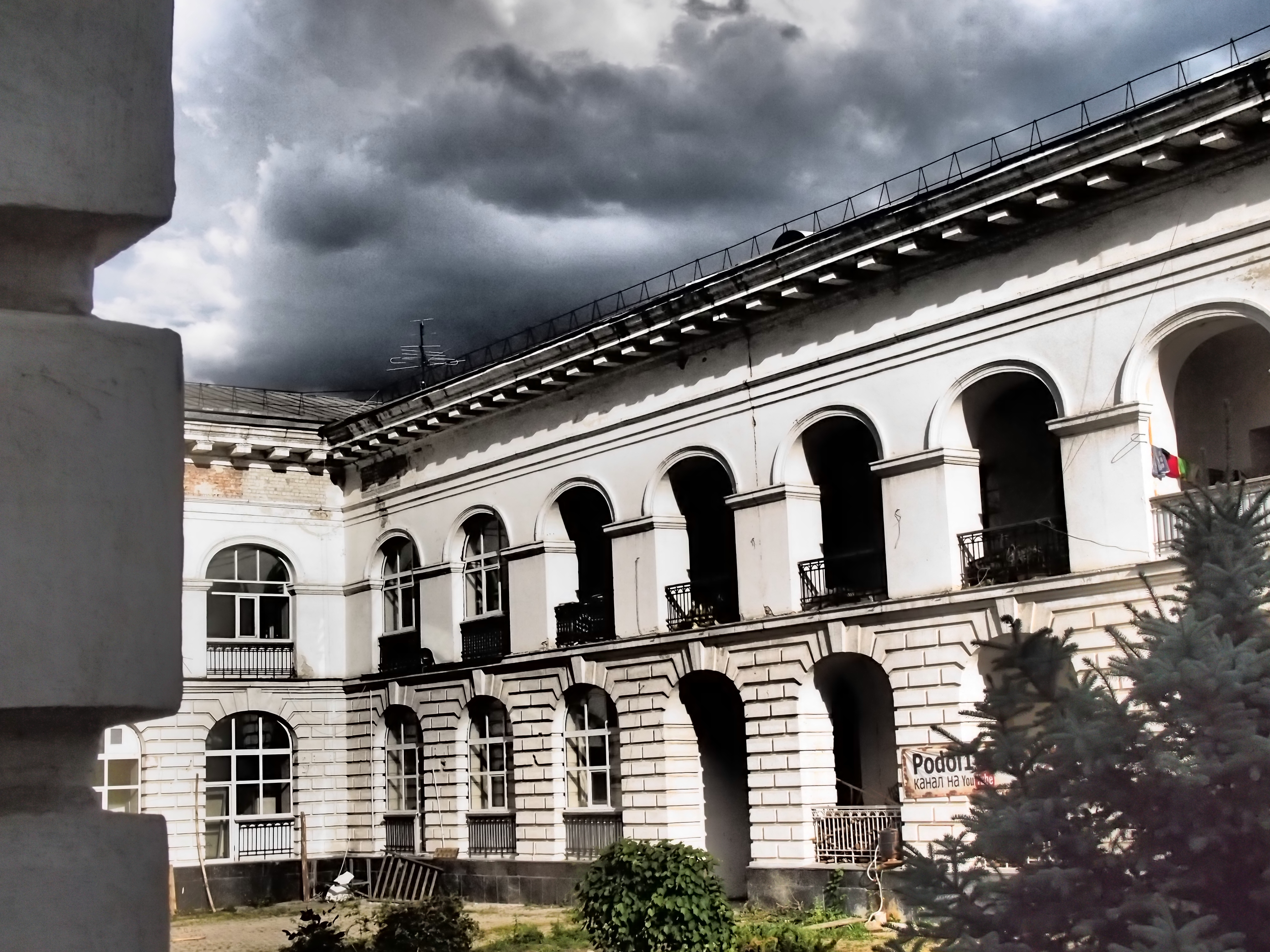 Гостинний двір